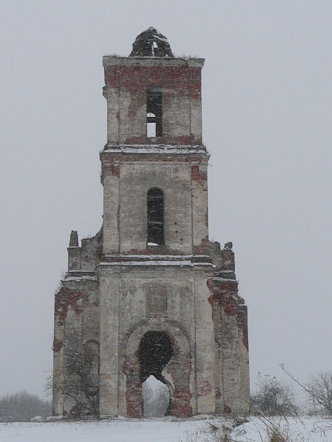 Руины Троицкой церкви, д. Белая Церковь, Чашникский район, Витебская область. Фото путешествия по Беларуси.